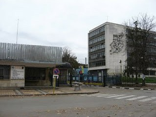 Част от сградите на ЕЛПРОМ-Троян